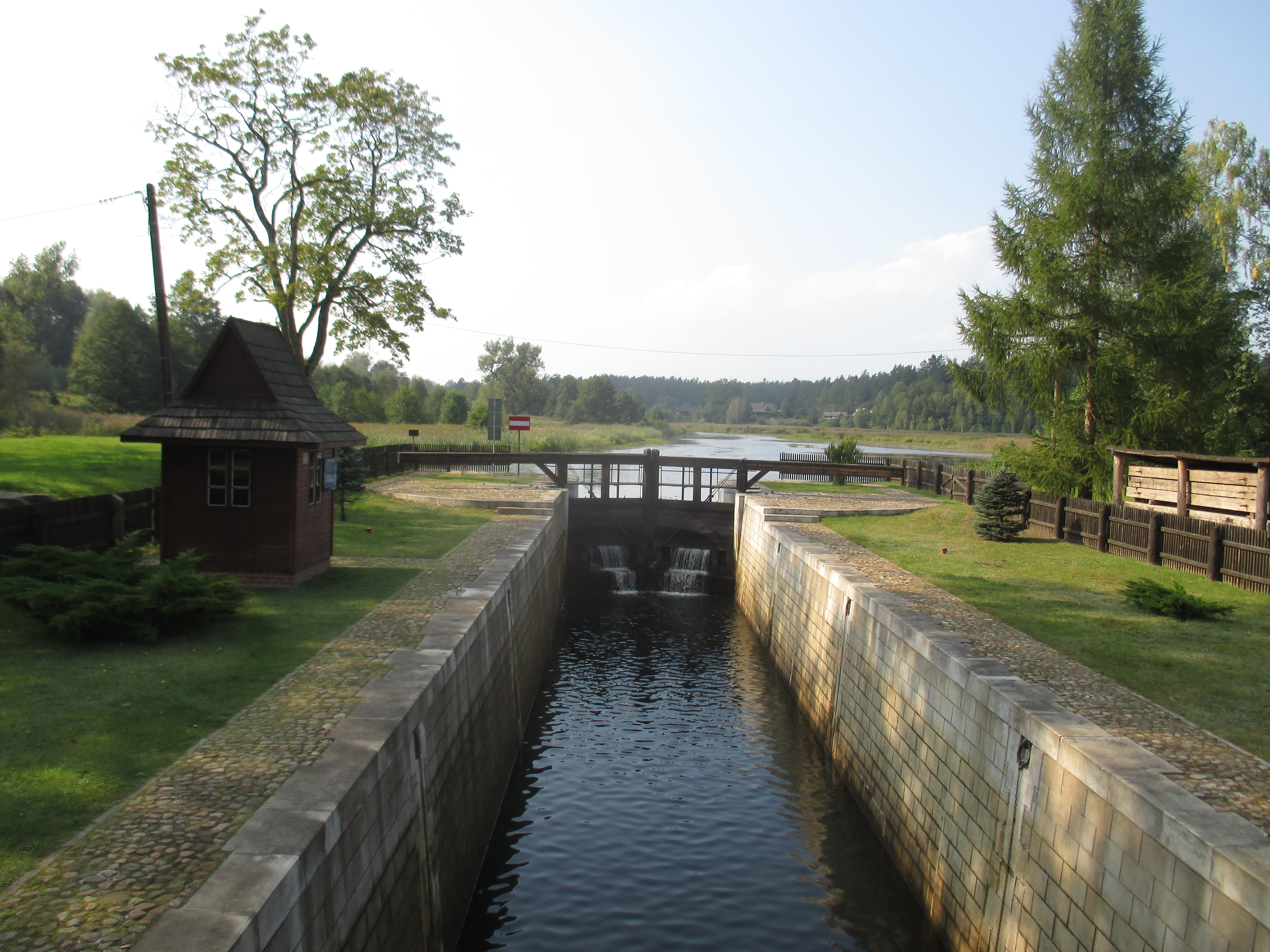 Widok na górne wrota i komorę śluzy